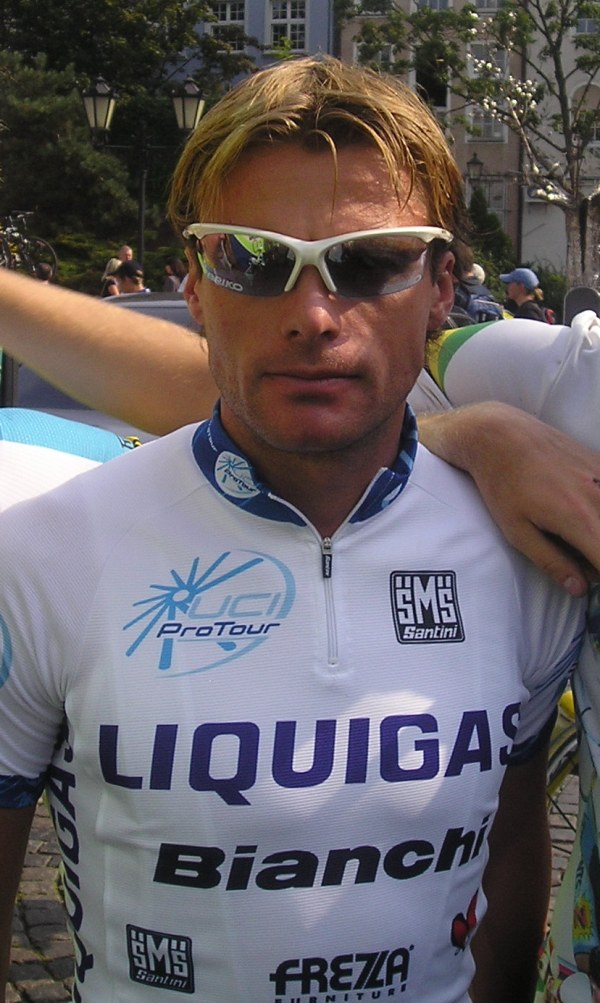 Danilo di Luca przed startem Tour de Pologne 2005. Autorem zdjęcia jest Pitert